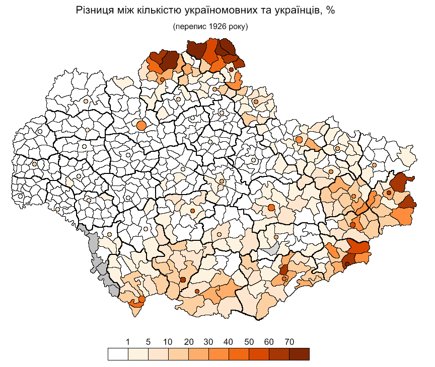 Difference between the number of ukrainian speakers and ethnic ukrainians in Ukrainian SSR, 1926 census